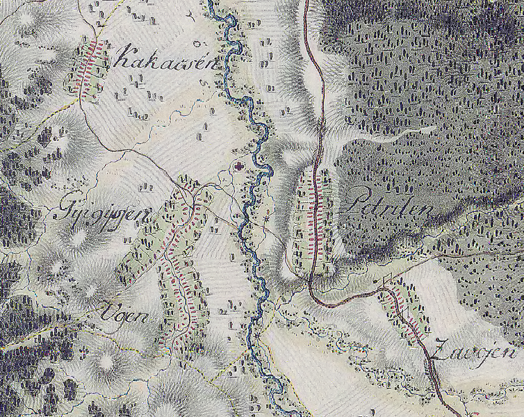 }Harta Iozefină a Ungariei, 1782-1785, fragment: satele Ghighişeni, Voieni, Cucuceni, Petrileni şi Zăvoieni în Bihor.